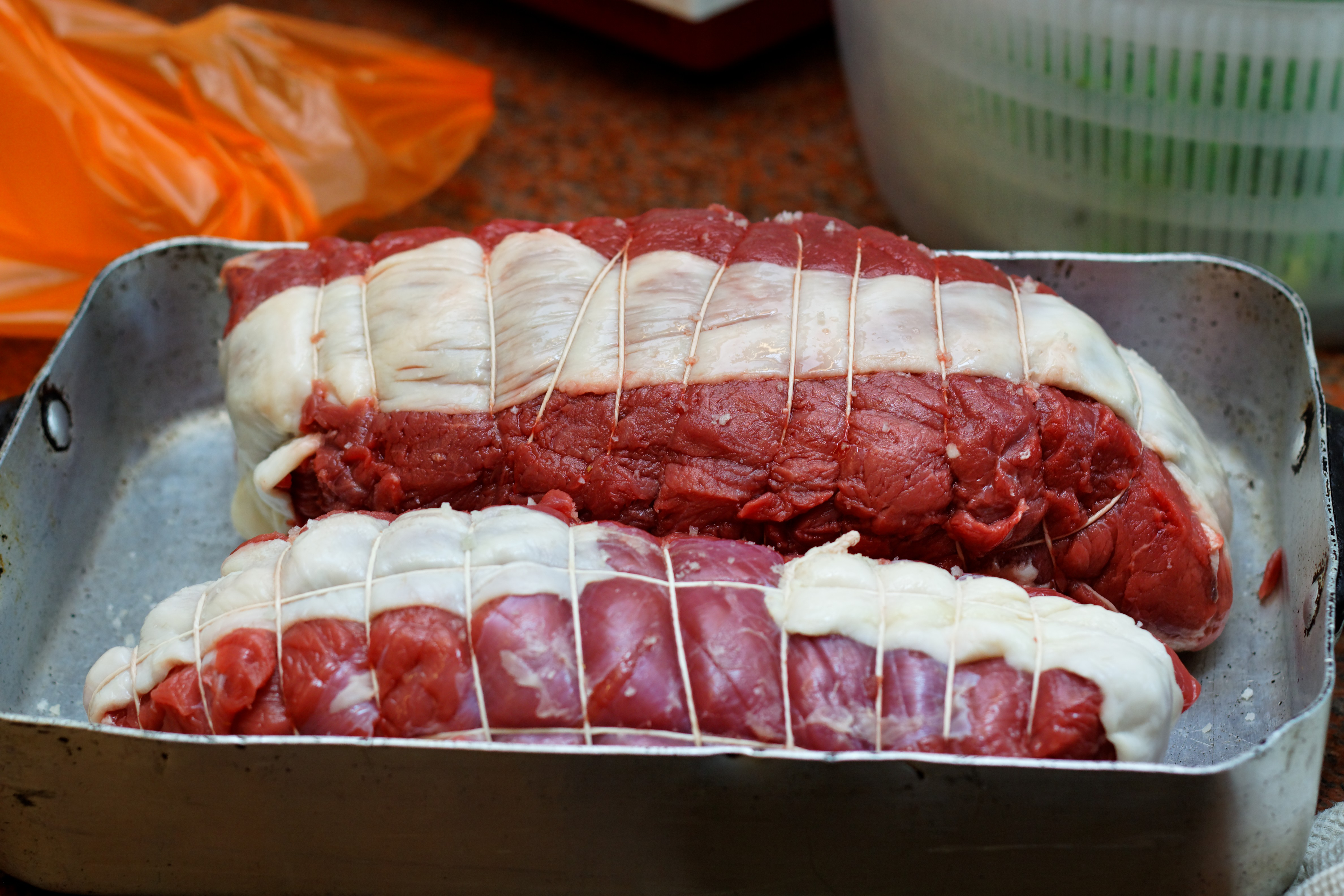 Rôtis de bœuf